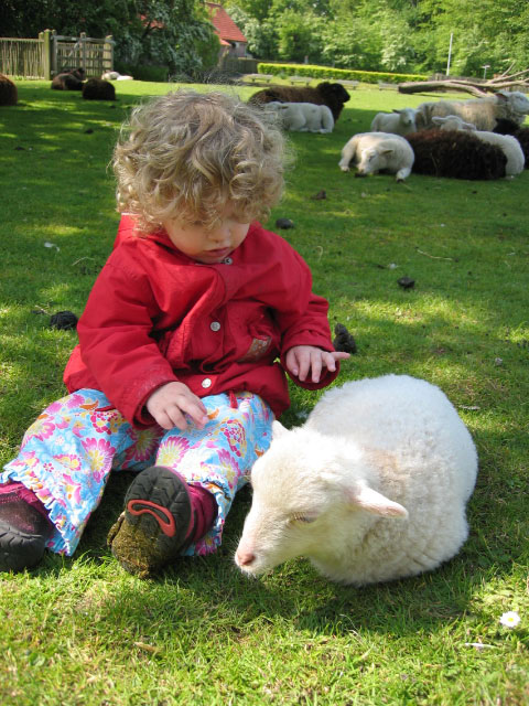 meisje aait schaapje op kinderboerderij